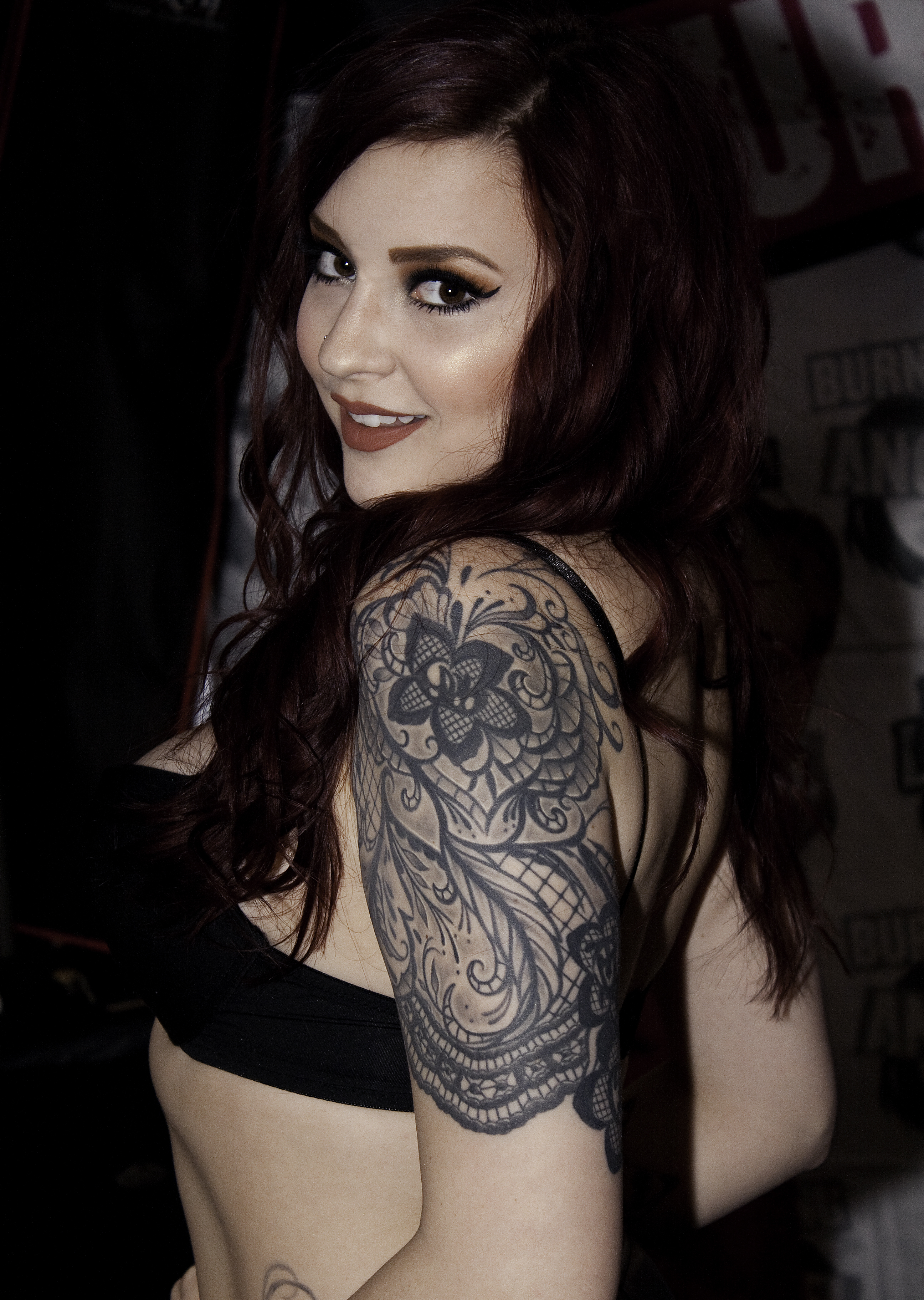 AEE16_0471bas